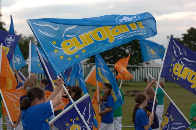 FahnenträgerInnen an der Eröffnungsfeier